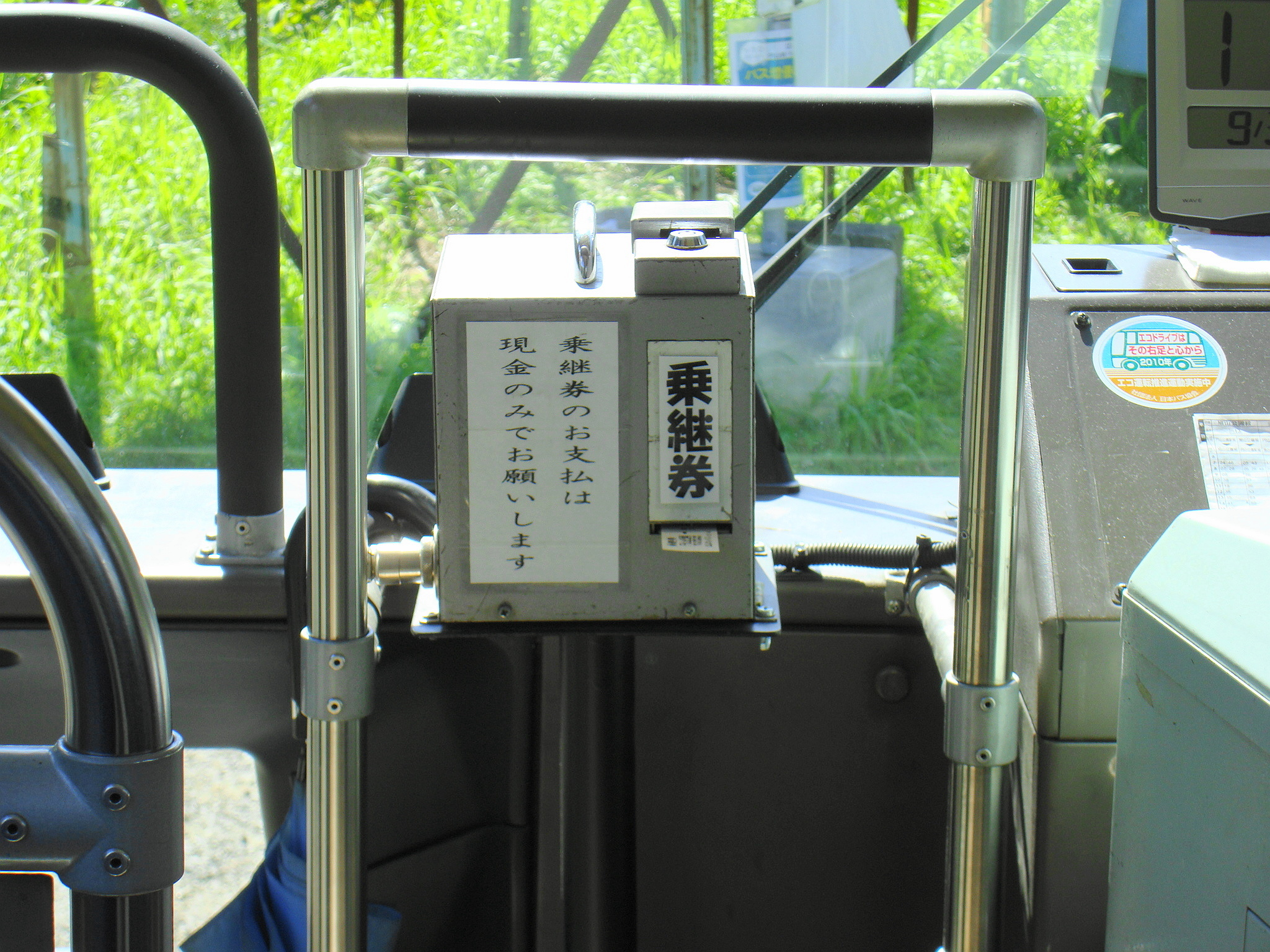 札幌市営地下鉄乗継券発行器